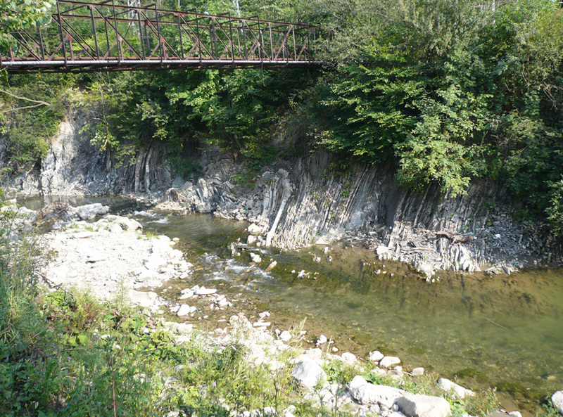 Prahova River in Sinaia